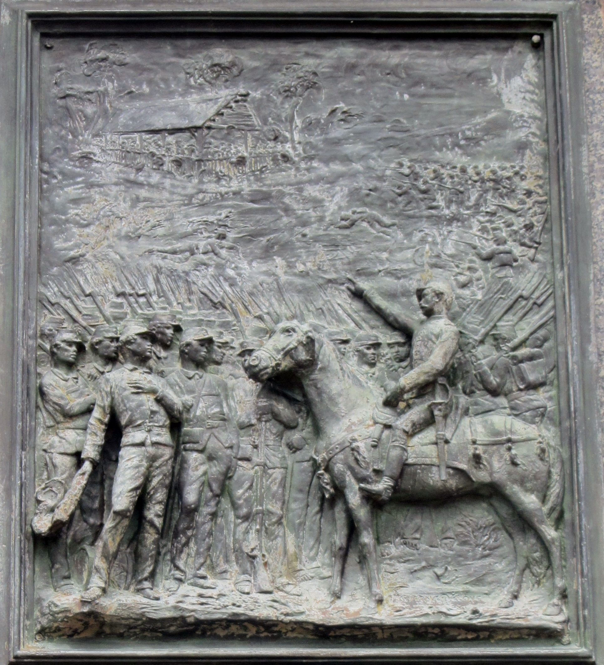 Bajorrelieve en estatua de Juan Santamaía, Alajuela, Costa Rica